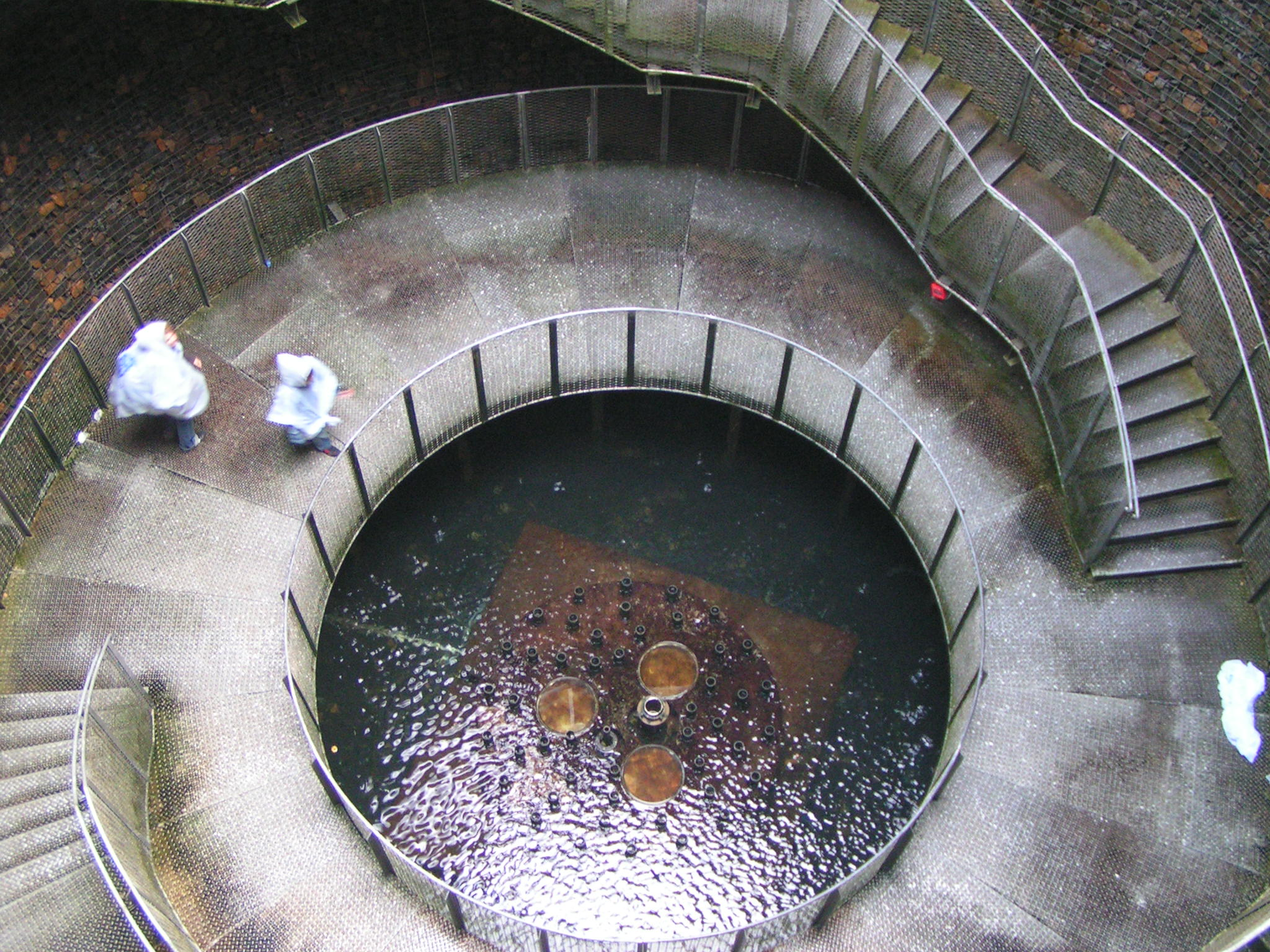 Wasserkrater auf dem Geländer der "Aqua Magica" in Bad Oeynhausen (ehemalige Landesgartenschau Nordrhein-Westfalen 2000)